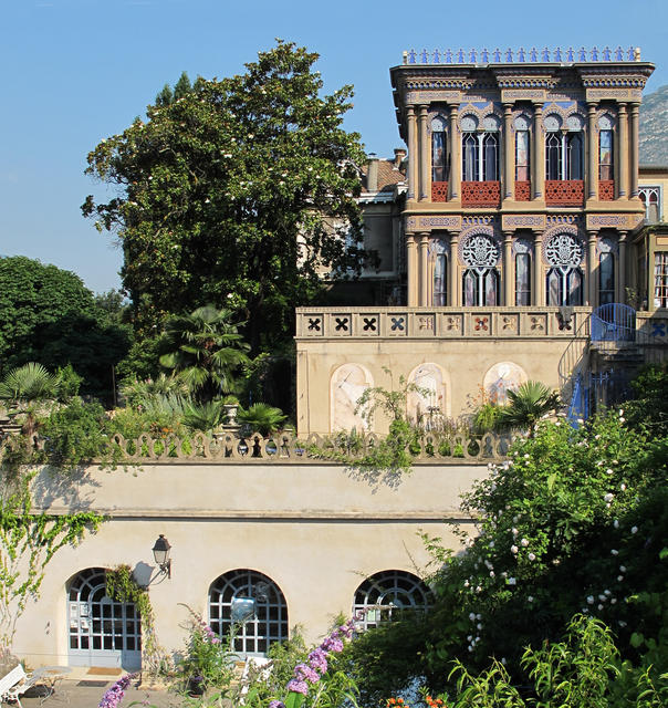 La Casamaures : monument historique de style orientaliste à St Martin le Vinoux, France. Vue de face en plein soleil, été 2010.